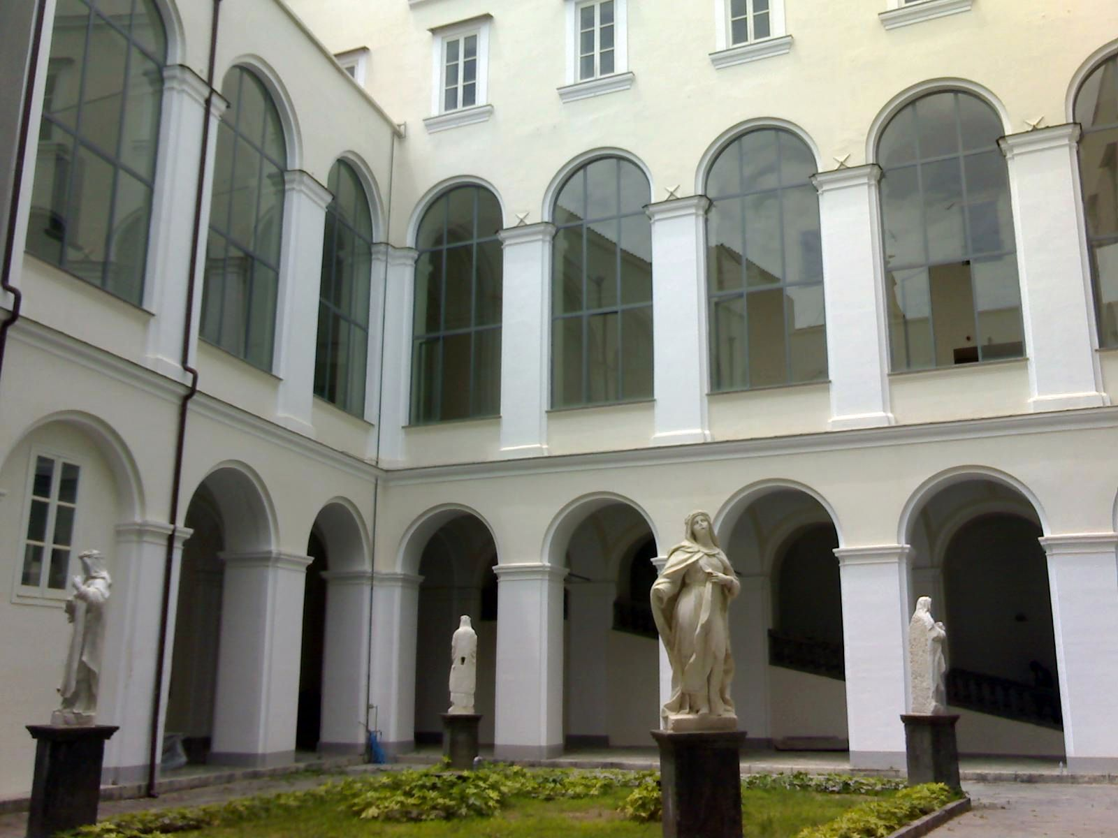 Convento di san Domenico Maggiore di Napoli - Chiostro delle Statue